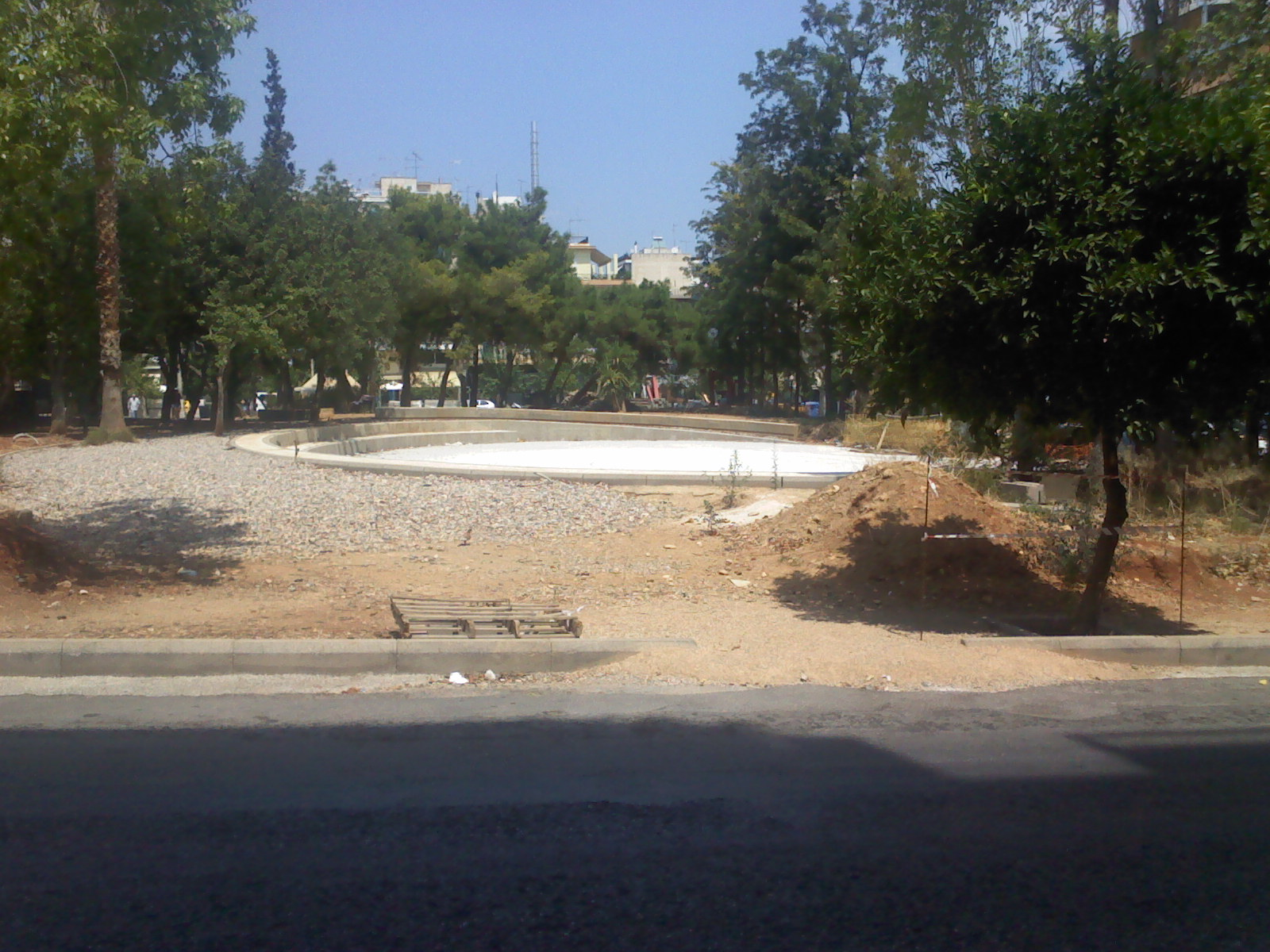 Square Pigada in Kallipoli